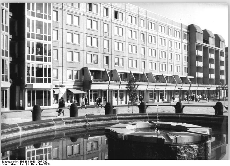 Dresden, Platz der Einheit, Springbrunnen ADN-ZB Häßler 7.12.1989 Dresden: Kontraste- Auch das ist die Äußere Neustadt: die fertiggstellte Nordseite am Platz der Einheit. In den Neubauten wurde neben verschiedenen Verkaufseinrichtungen das "Cafe Kästner" und die Weinstube "Laterne" eingeordnet. Der artesische Brunnen wurde neu gestaltet. – siehe auch 1989-1207-006 und 1989-1207-007